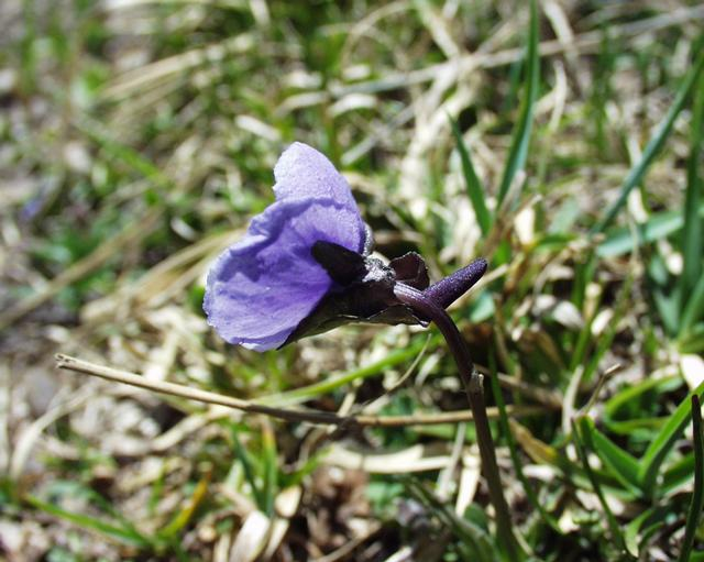 (en) Long-spurred Pansy (Viola calcarata), a photography originating of the internet site The accord of the autor, H. Brisse, is here. (fr) Pensée éperonnée (Viola calcarata), une photographie issue du site internet L'accord de l'auteur, H. Brisse, se situe ici.